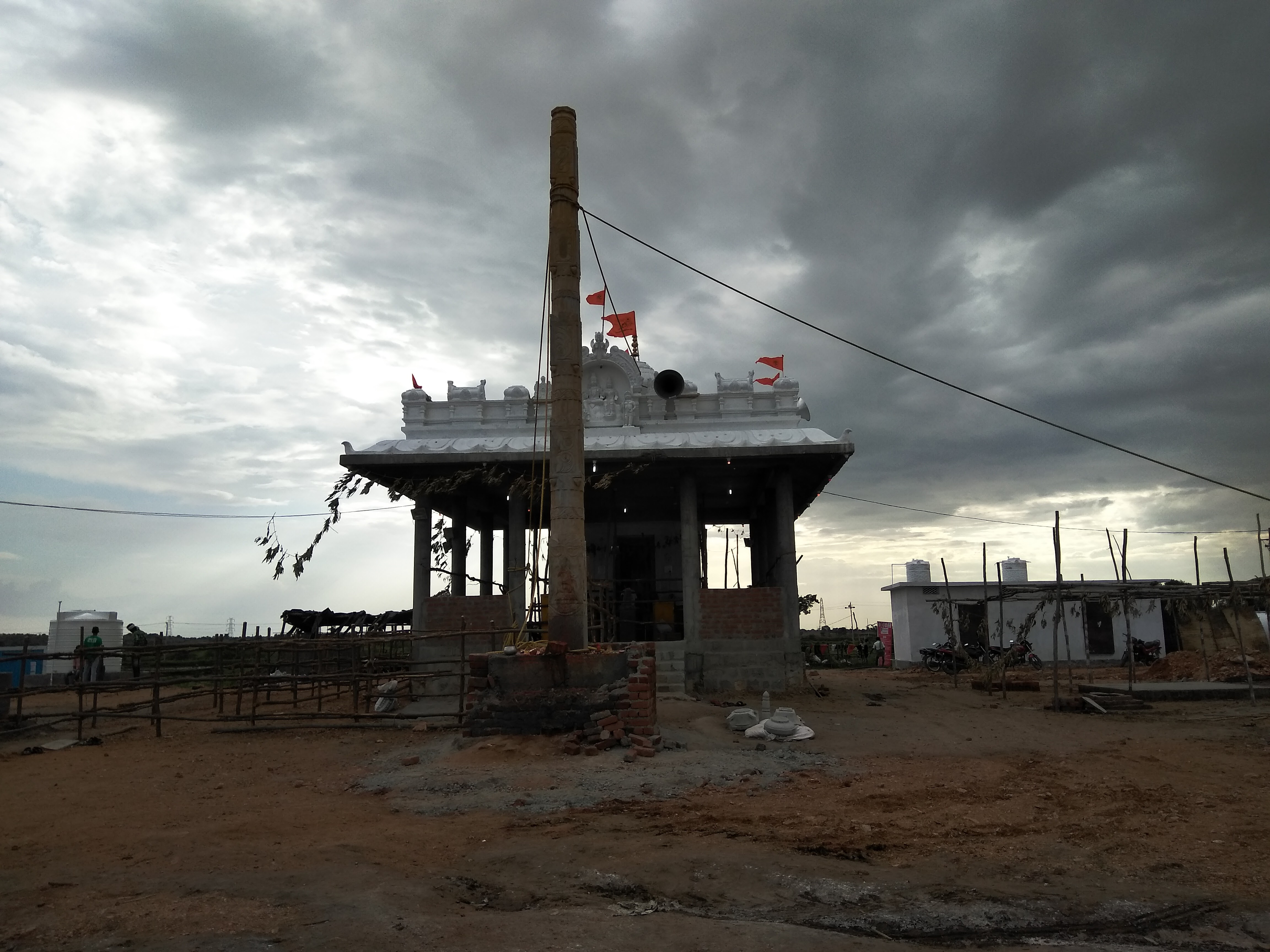 శివాలయం, బీరోలు